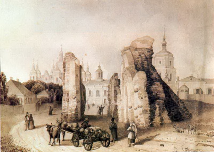 Залишки Золотих ворот, 1846 р.